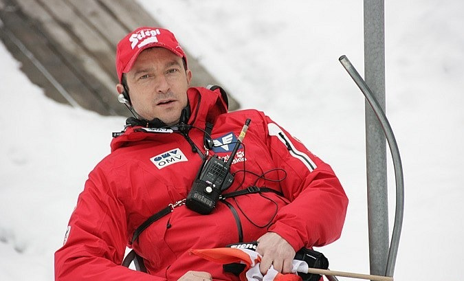 Alexander Pointner podczas konkursu indywidualnego mężczyzn na skoczni normalnej w ramach Mistrzostw Świata 2013.